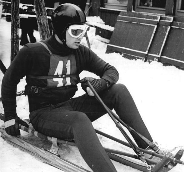 Klaus Bonsack Zentralbild Studre´ 23.2.1969-Friedrichroda: DDR-Meisterschaften im Rennschlittensport-Altmeister Klaus Bonsack (SC Traktor Oberwiesenthal) erkämpfte sich am 23.2.1969 in Friedrichroda bei den Deutschen Rennschlitten-Meisterschaften der DDR den Titel im Einsitzer-Wettbewerb der Herren.